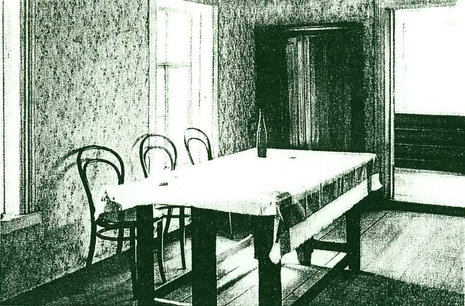 Комната на даче Звержинской в Озерках, в которой был убит Георгий Гапон